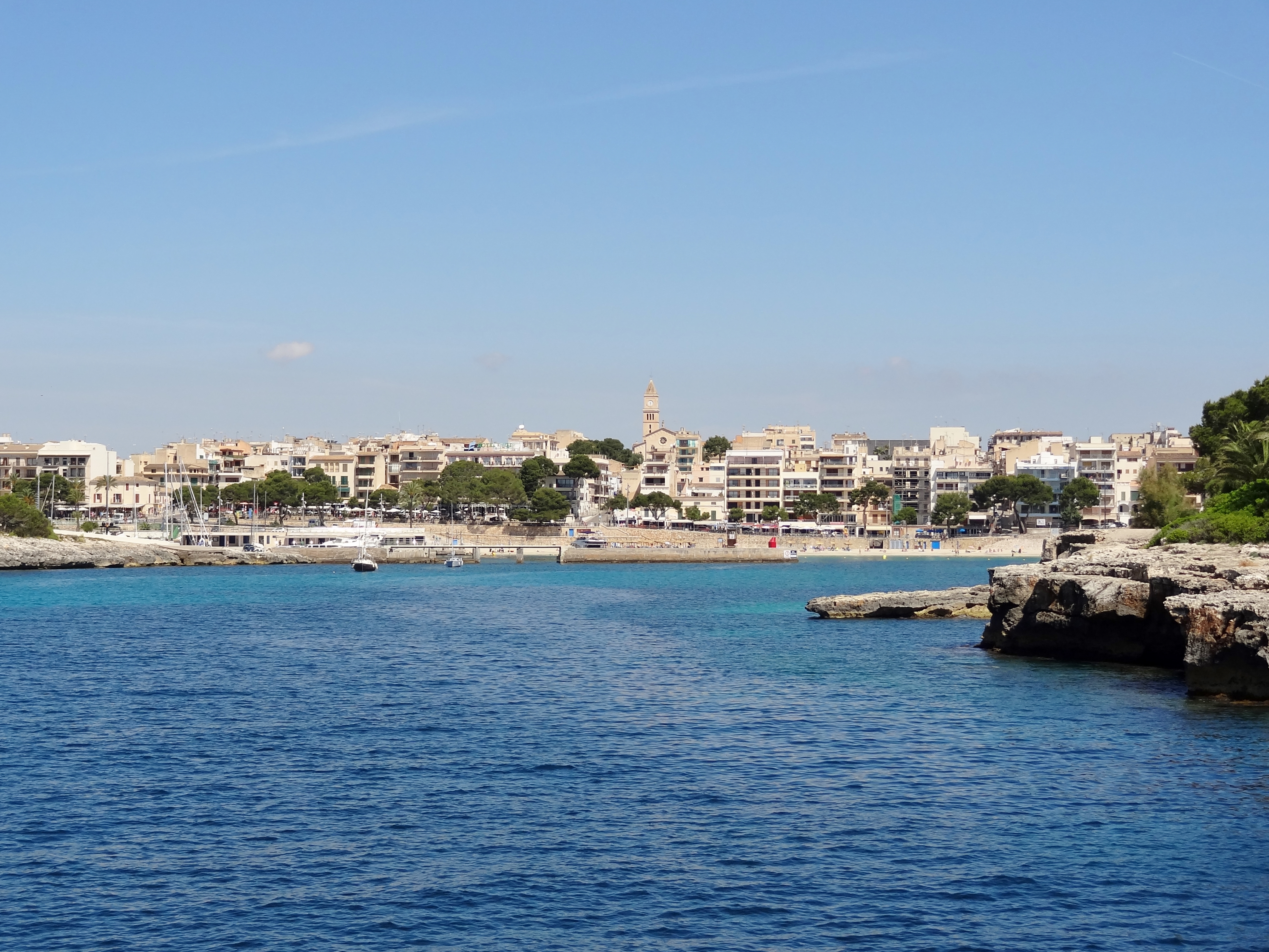 Cala Manacor, Bucht von Porto Cristo in der Gemeinde Manacor, Mallorca, Spanien